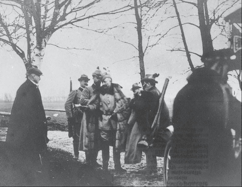 Pocztówka z okazji polowania zorganizowanego w 1906 roku, na którym obecny był cesarz niemiecki, Wilhelm II